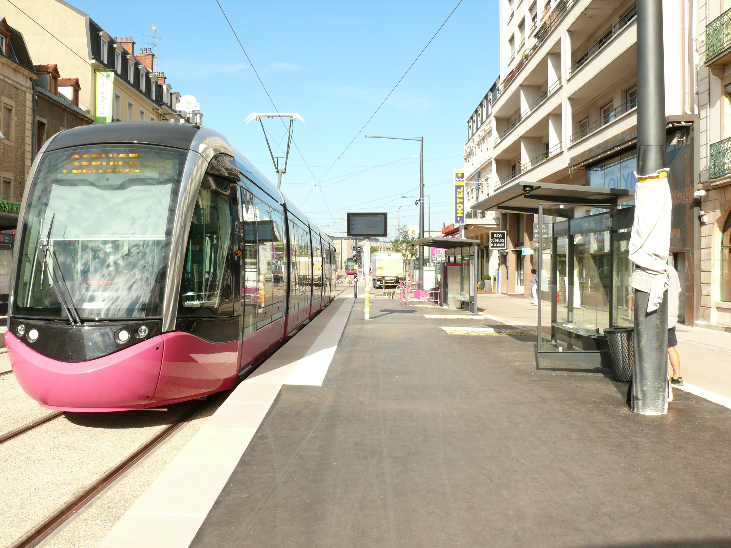 Tramway de Dijon - Tramway en essai à la station Foch-Gare